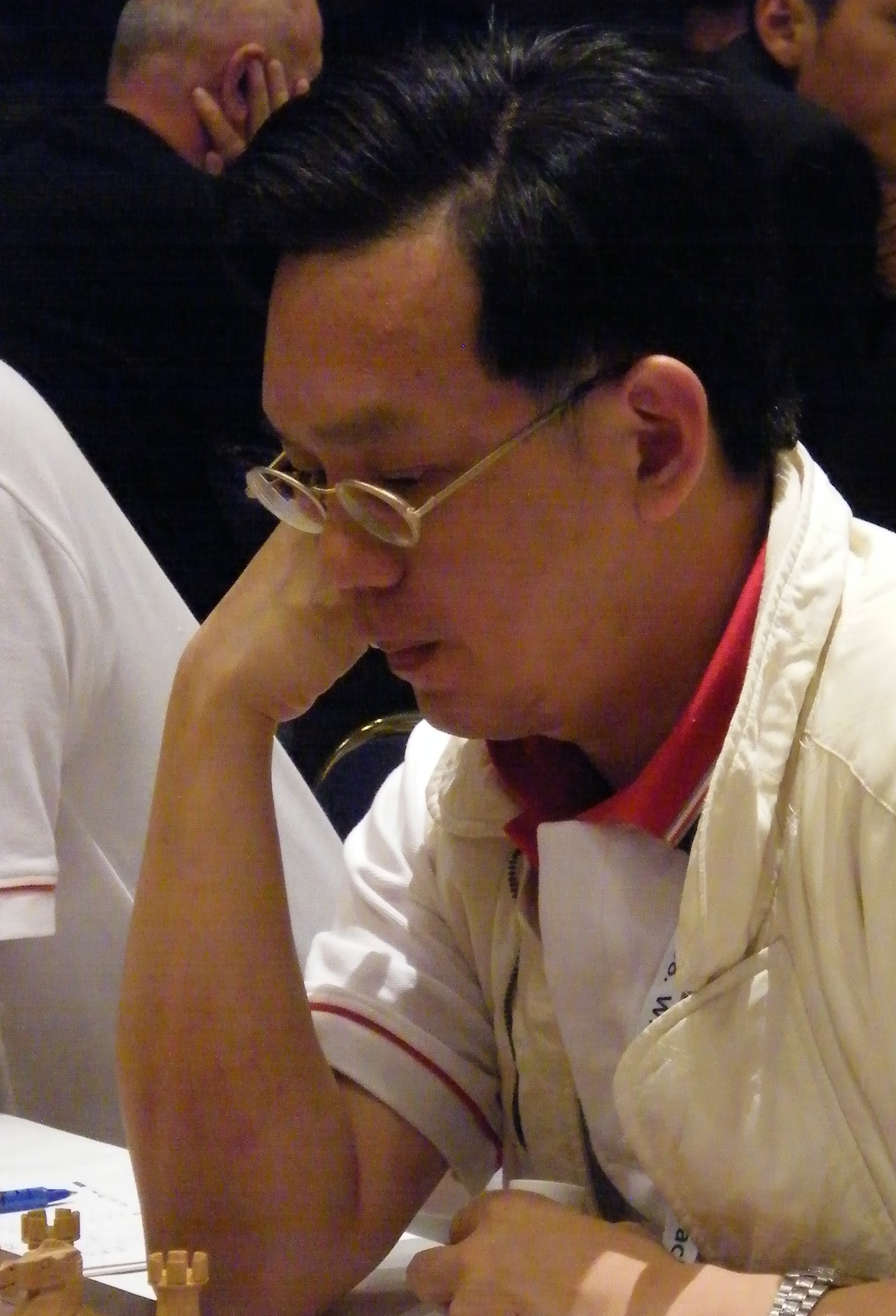 FM Wisuwat Teerapabpaisit bei der 38. Schacholympiade in Dresden 2008